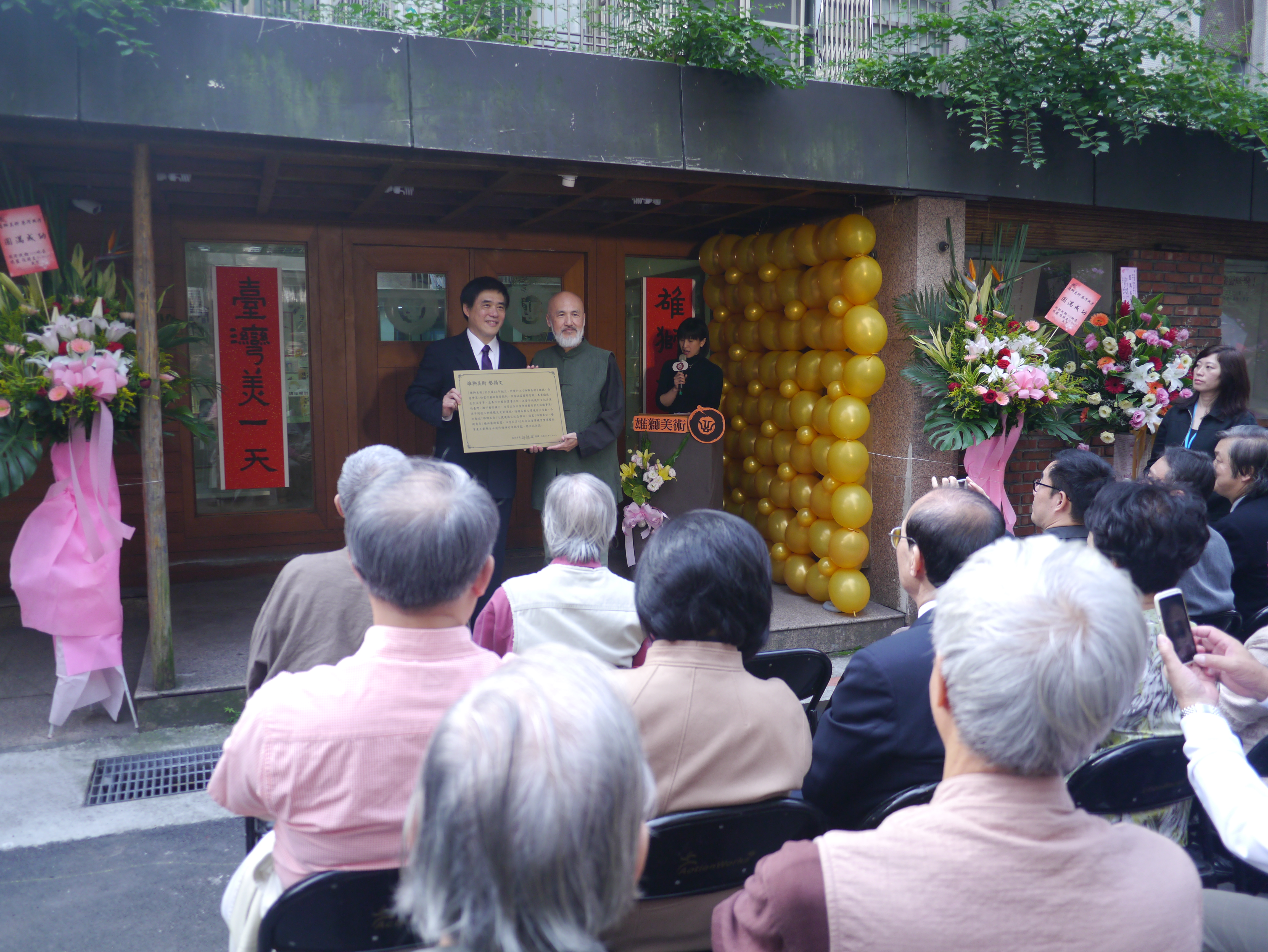 2012年12月16日，雄獅美術譽揚典禮，臺北市長郝龍斌頒發譽揚牌給雄獅美術發行人李賢文。